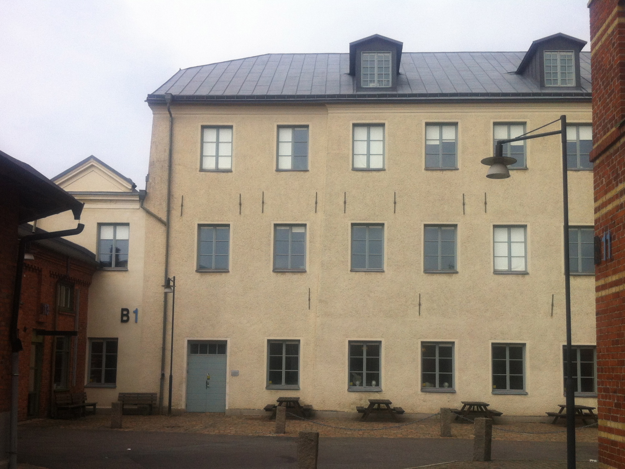 Sahlgrenska sockerbruket, Ånäs landeri